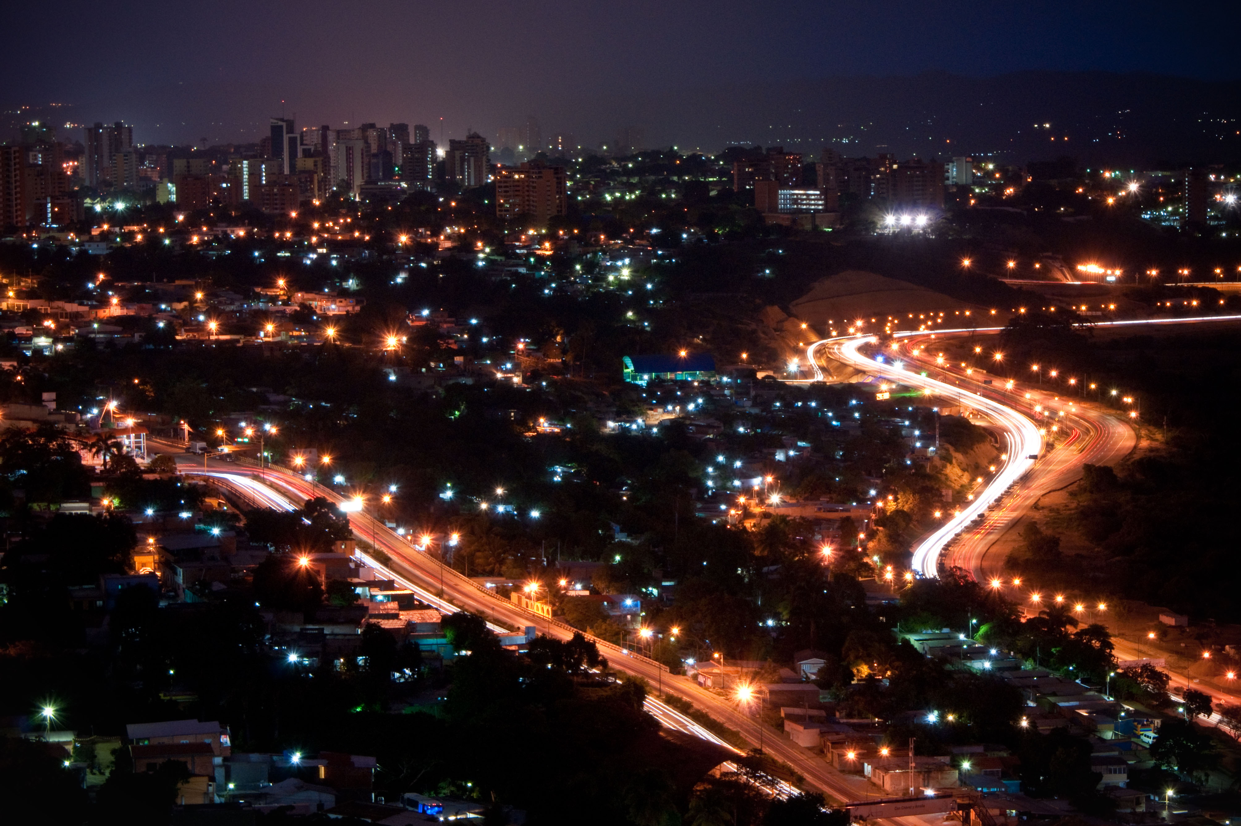 Barquisimeto de Noche